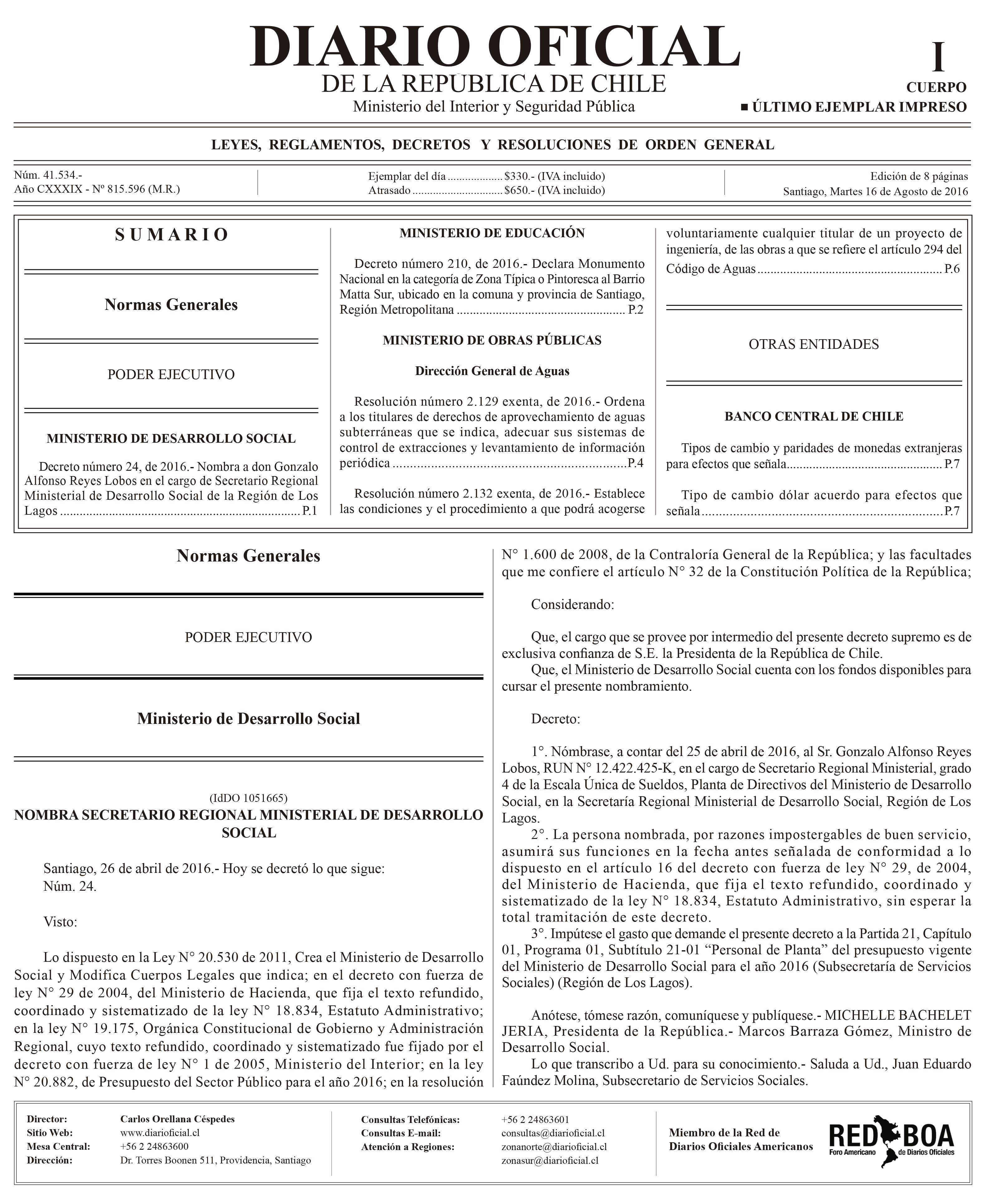 Portada de la última edición impresa del Diario Oficial de la República de Chile, publicada el 16 de agosto de 2016.